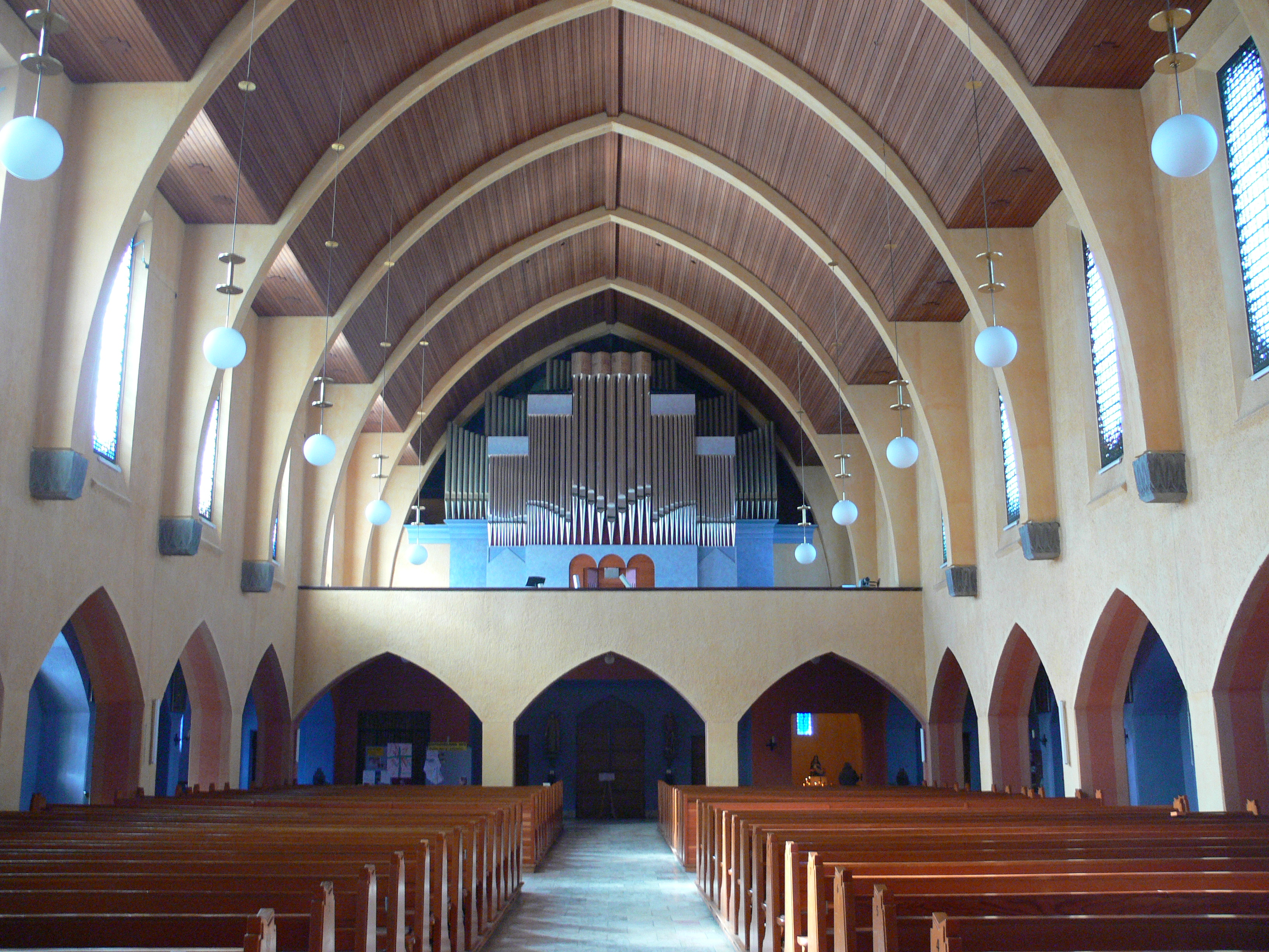 Friedrichshafen, Pfarrkirche St. Petrus Canisius